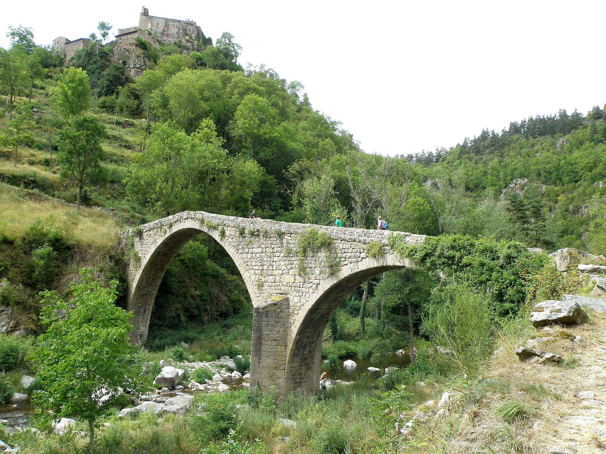 Hameau de Chalencon, appartenant à la comm. de Saint-André-de-Chalencon, dép. de la Haute-Loire, France (région Auvergne). Pont du Diable sur la rivière l'Ance. La chapelle de Chalencon et une partie du bourg sont visibles en haut à gauche.